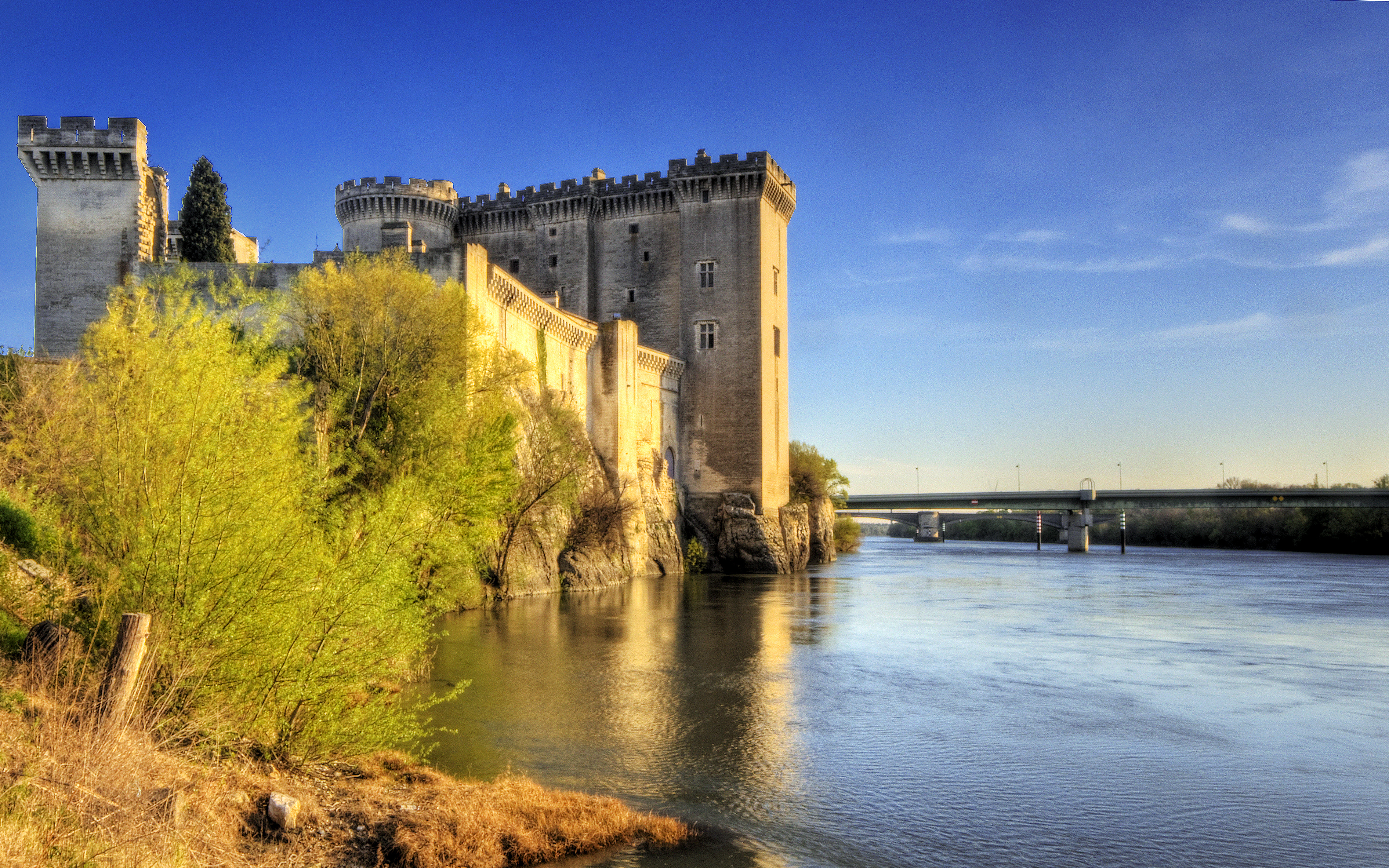 Tarascon est une commune française, située à l'extrémité Ouest du département des Bouches-du-Rhône et de la région Provence-Alpes-Côte d'Azur. Ses habitants sont appelés les Tarasconnais.